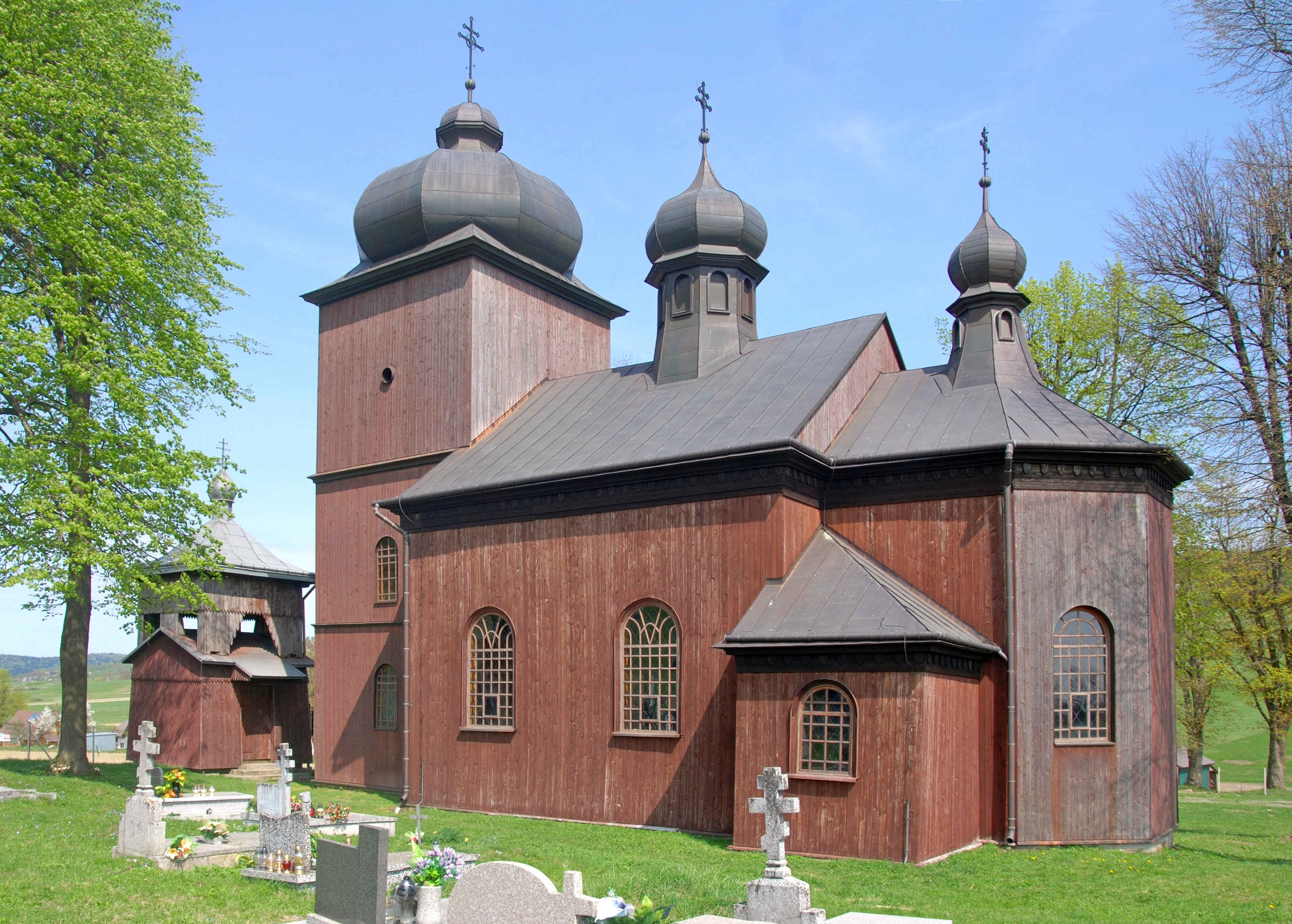 wieś Konieczna